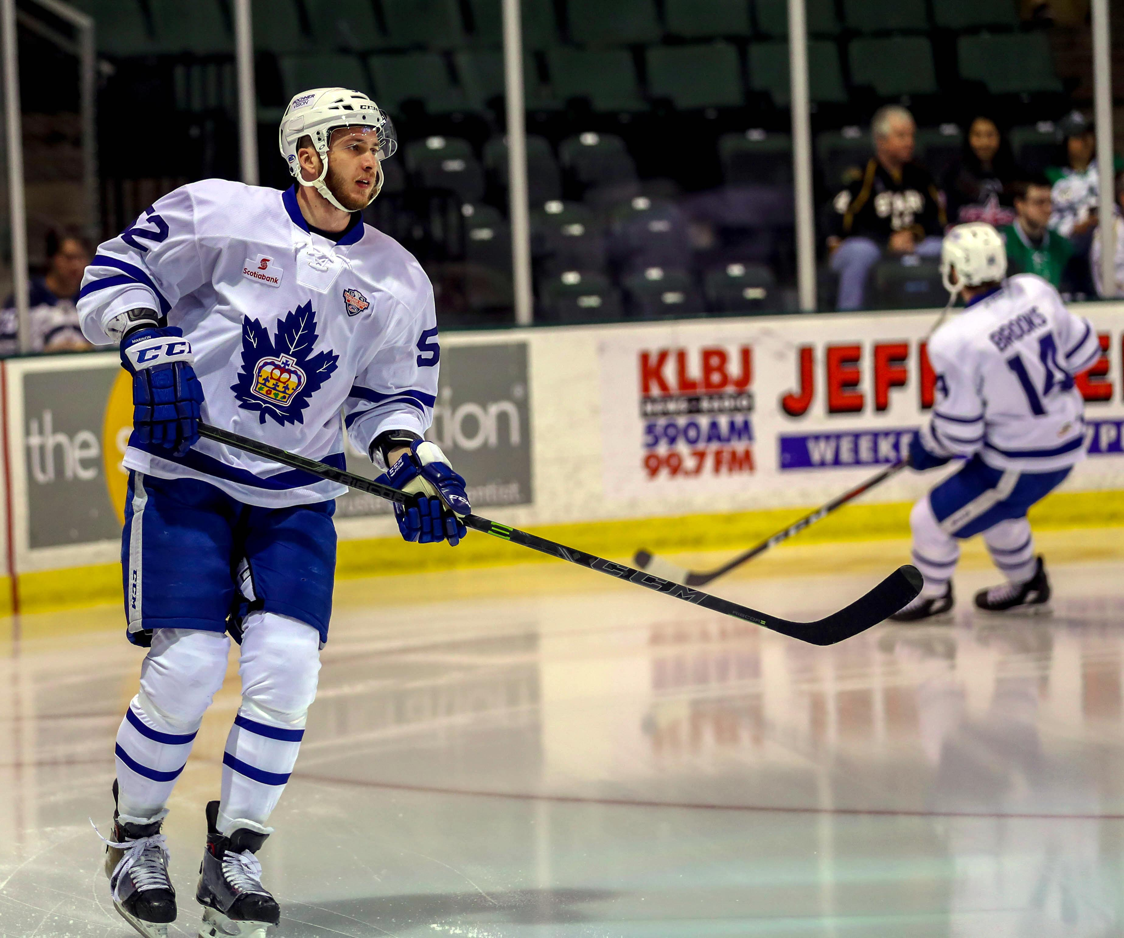 Photo: Derek Sparta